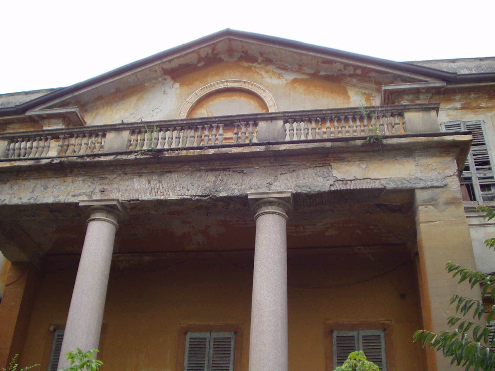 Villa Mirabellino nel Parco di Monza particolare del timpano e del pronao del prospetto verso villa Mirabello